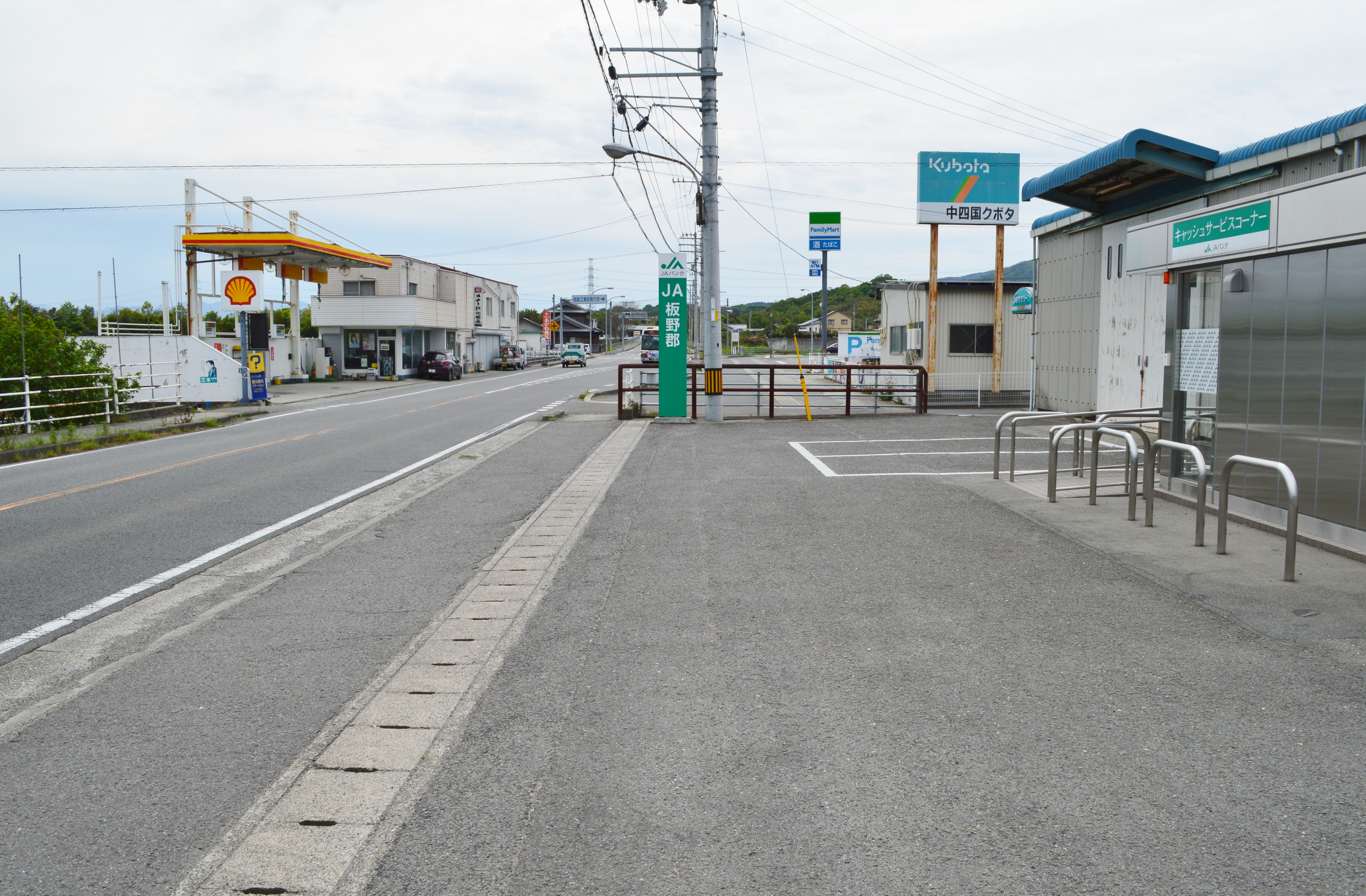 犬伏駅 (徳島県) 跡地付近 Nikon D3200